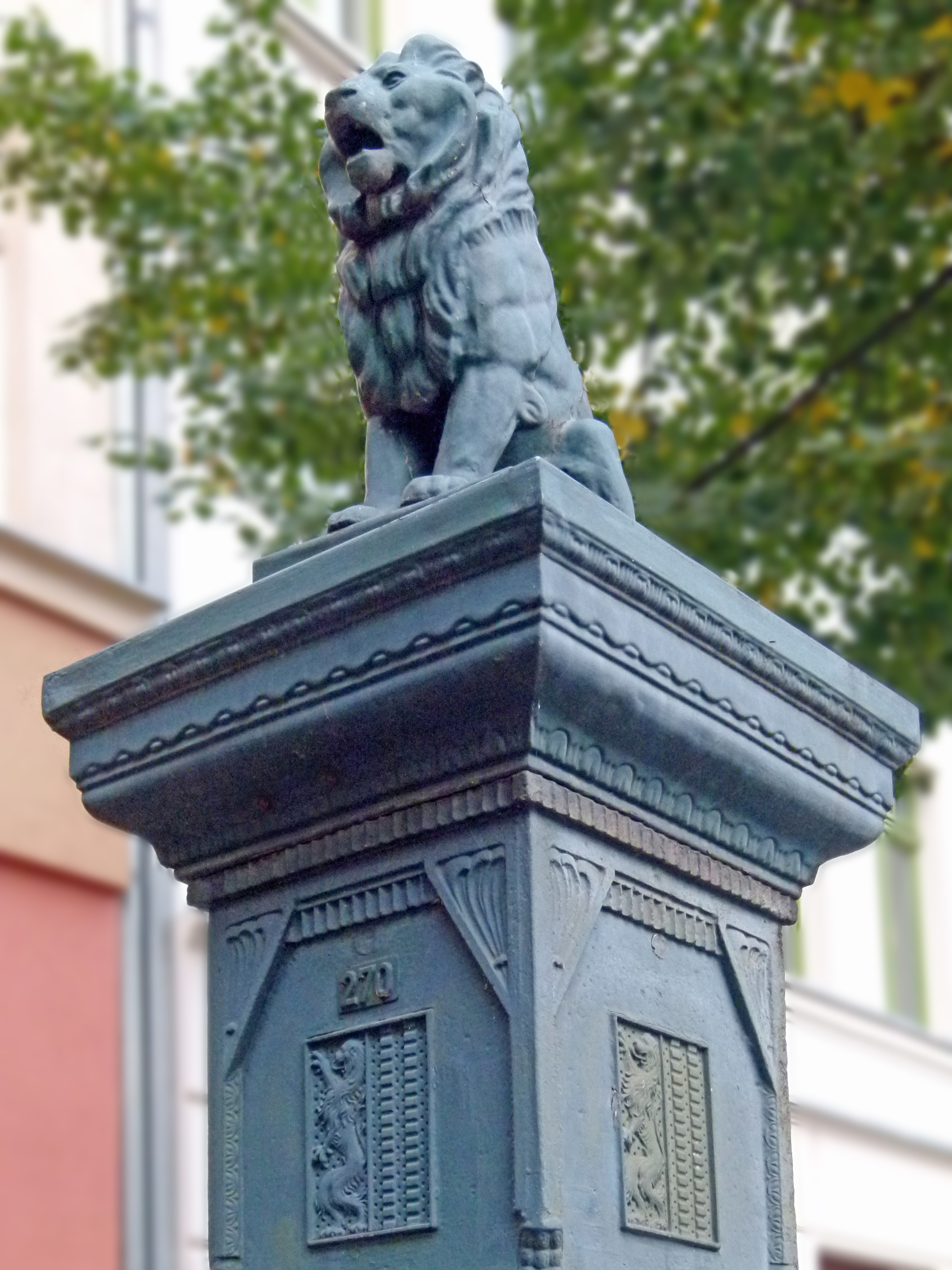 Handschwengelpumpe, Bornaische Straße 3c, Leipzig